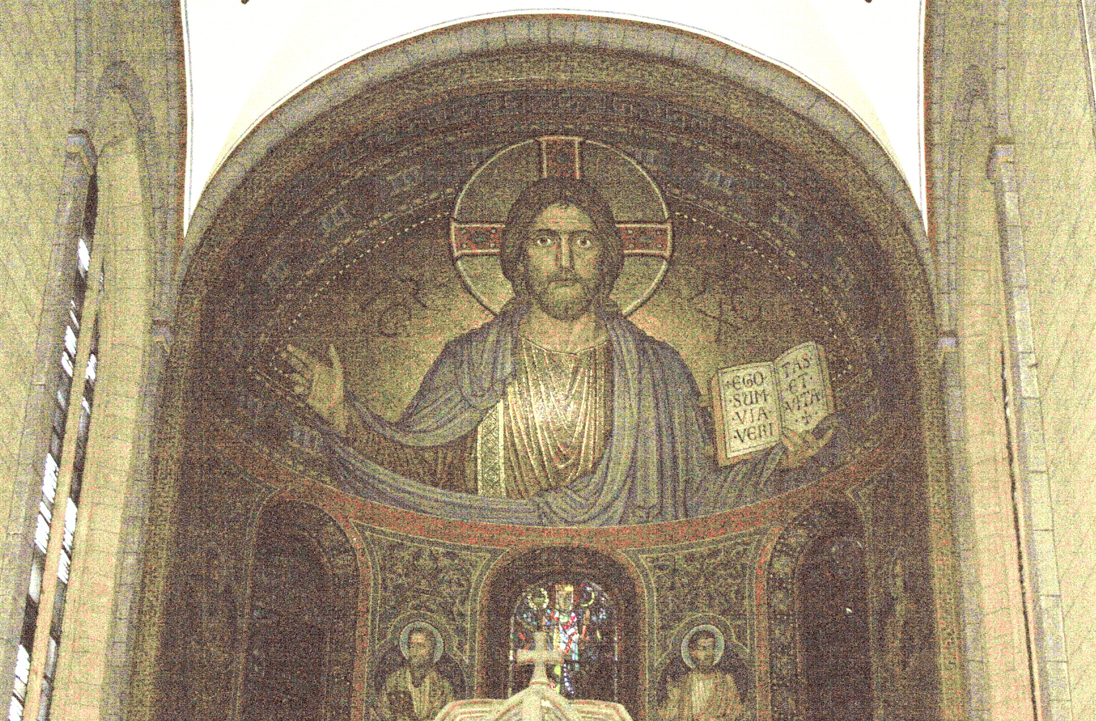 Apsismosaik an der Abteikierch Maria Laach.